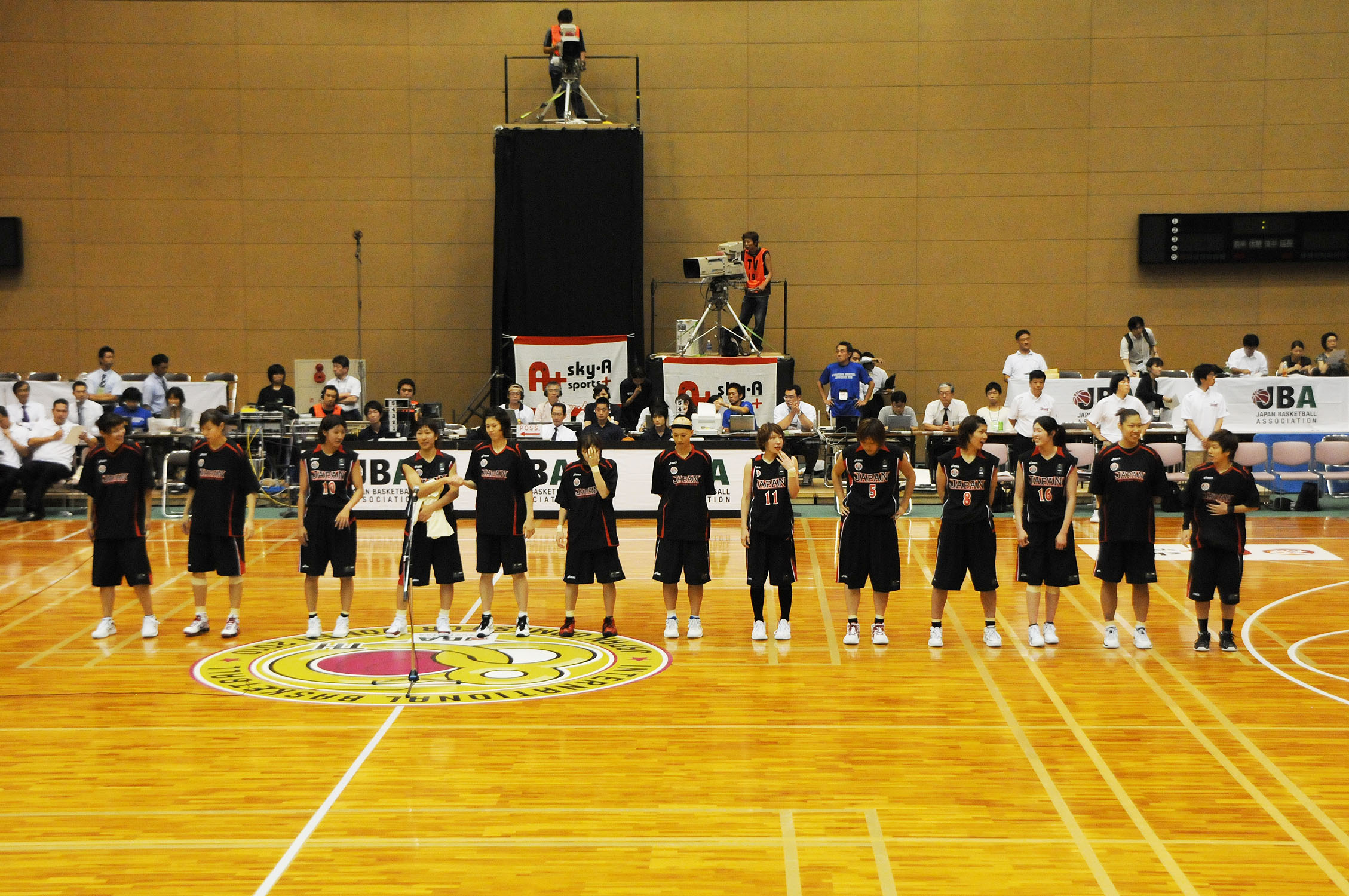 バスケットボール女子日本代表チーム。青葉体育館で。